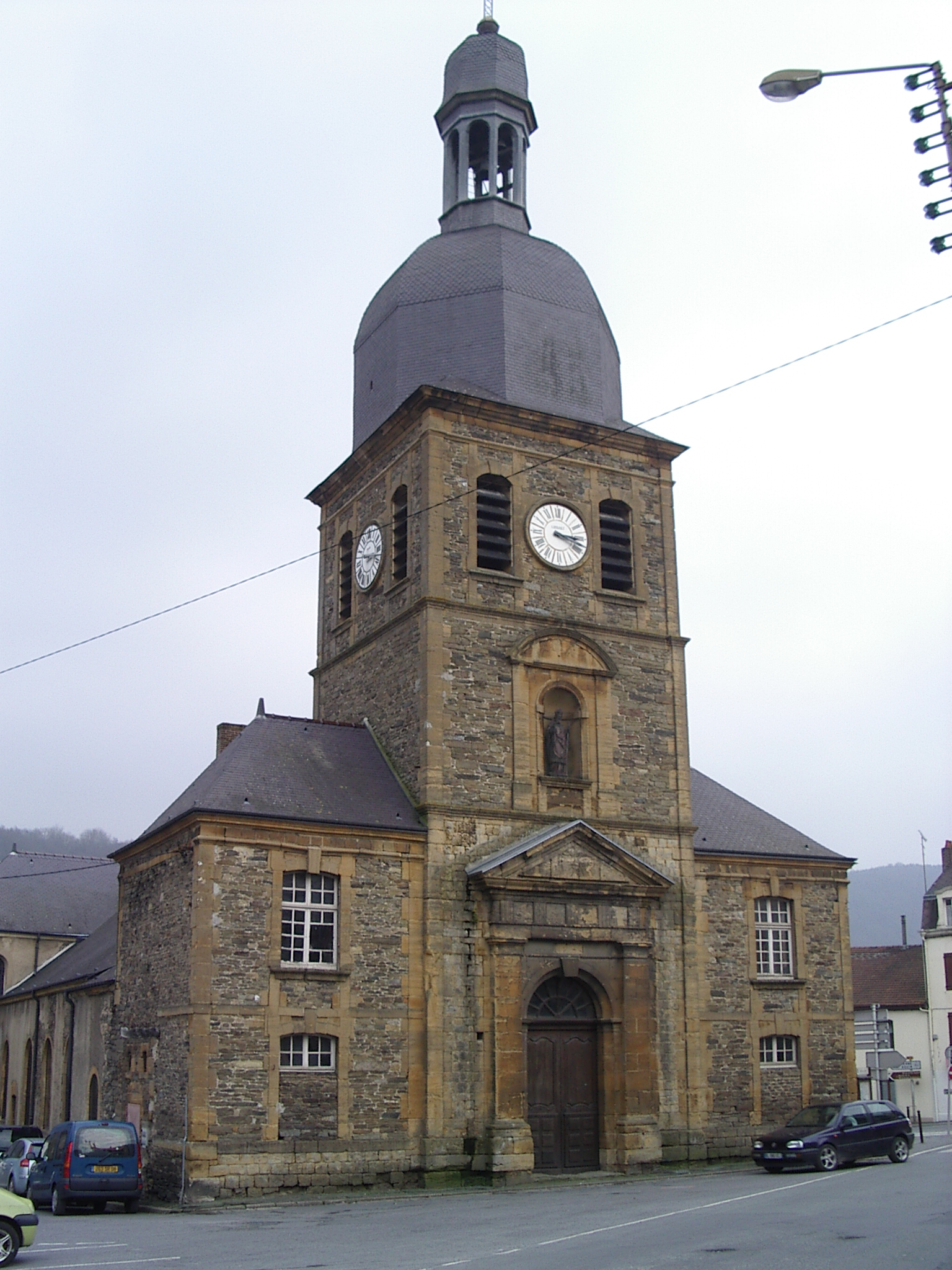 Collégiale Saint-Vivent de Braux,- Bogny sur Meuse - Ardennes- France